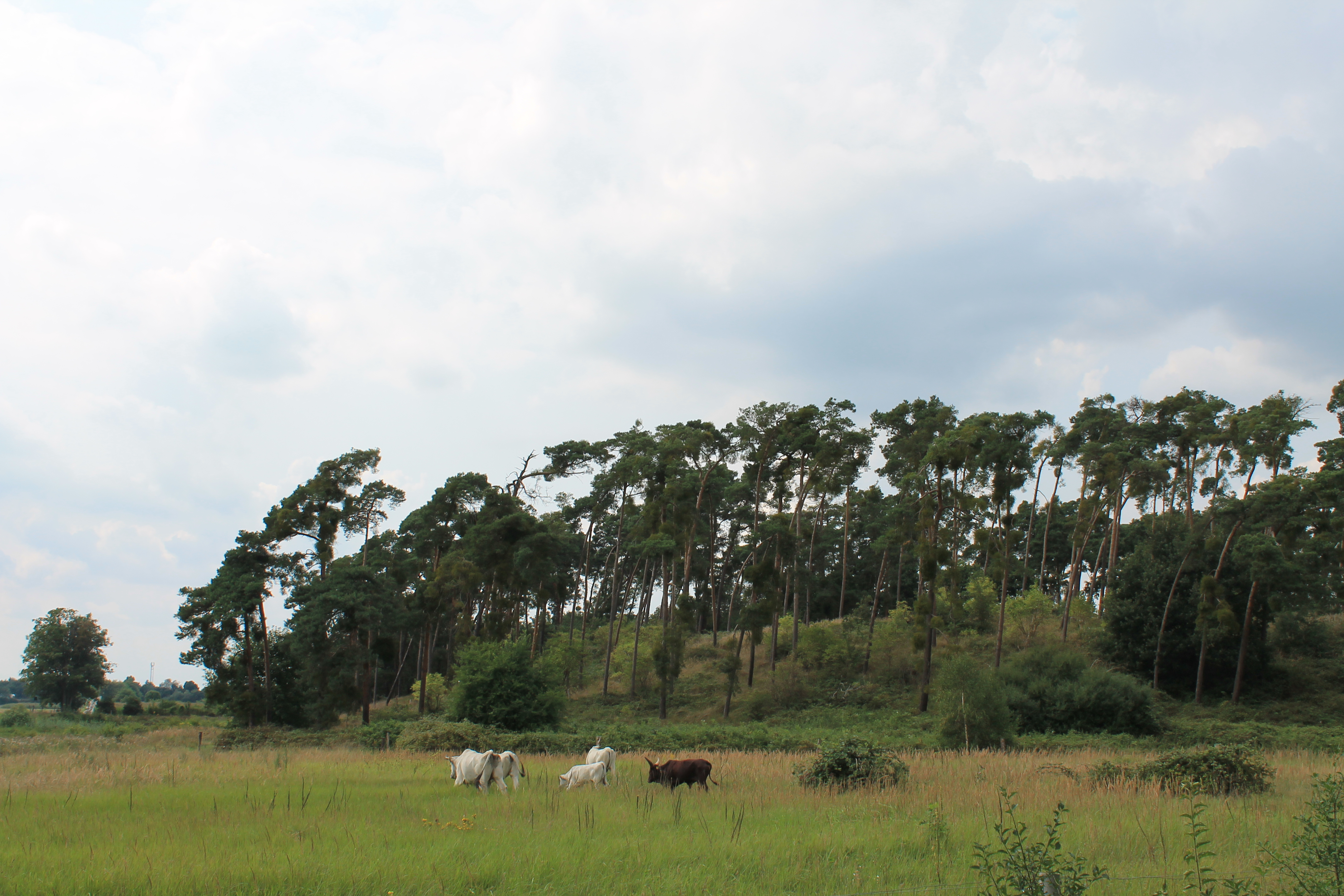 Naturnahe Beweidung im Bereich der Wattenheimer Brücke in Lorsch (Hessen)